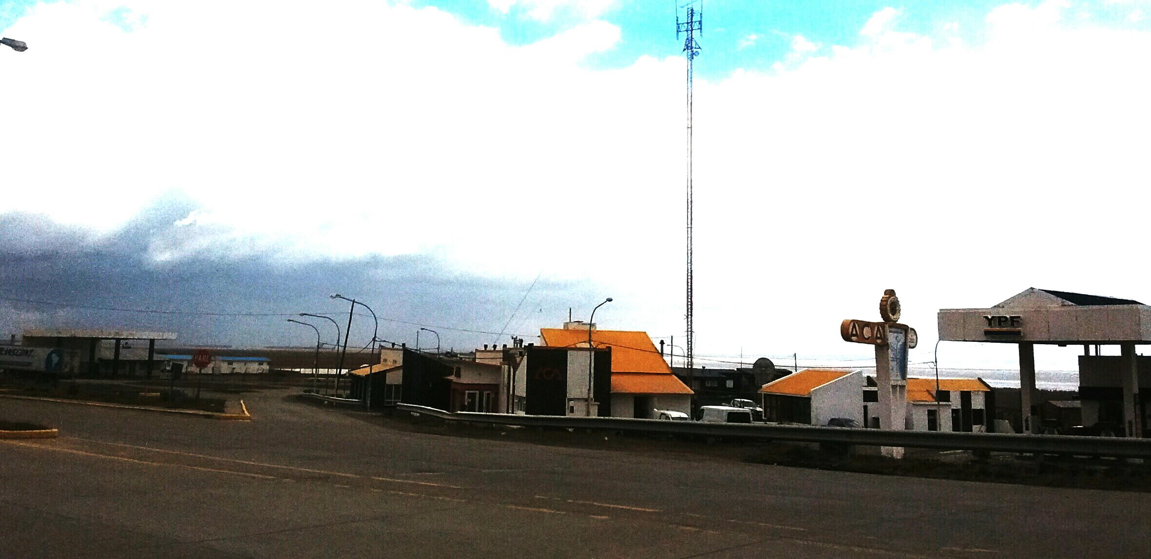 Agrupación de comercios y viviendas cerca del paso internacional